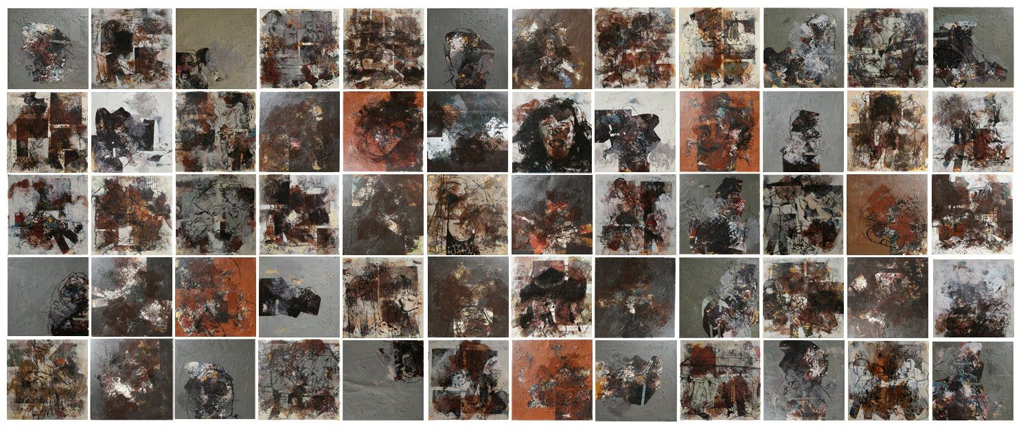 Hanoos, Bagdad